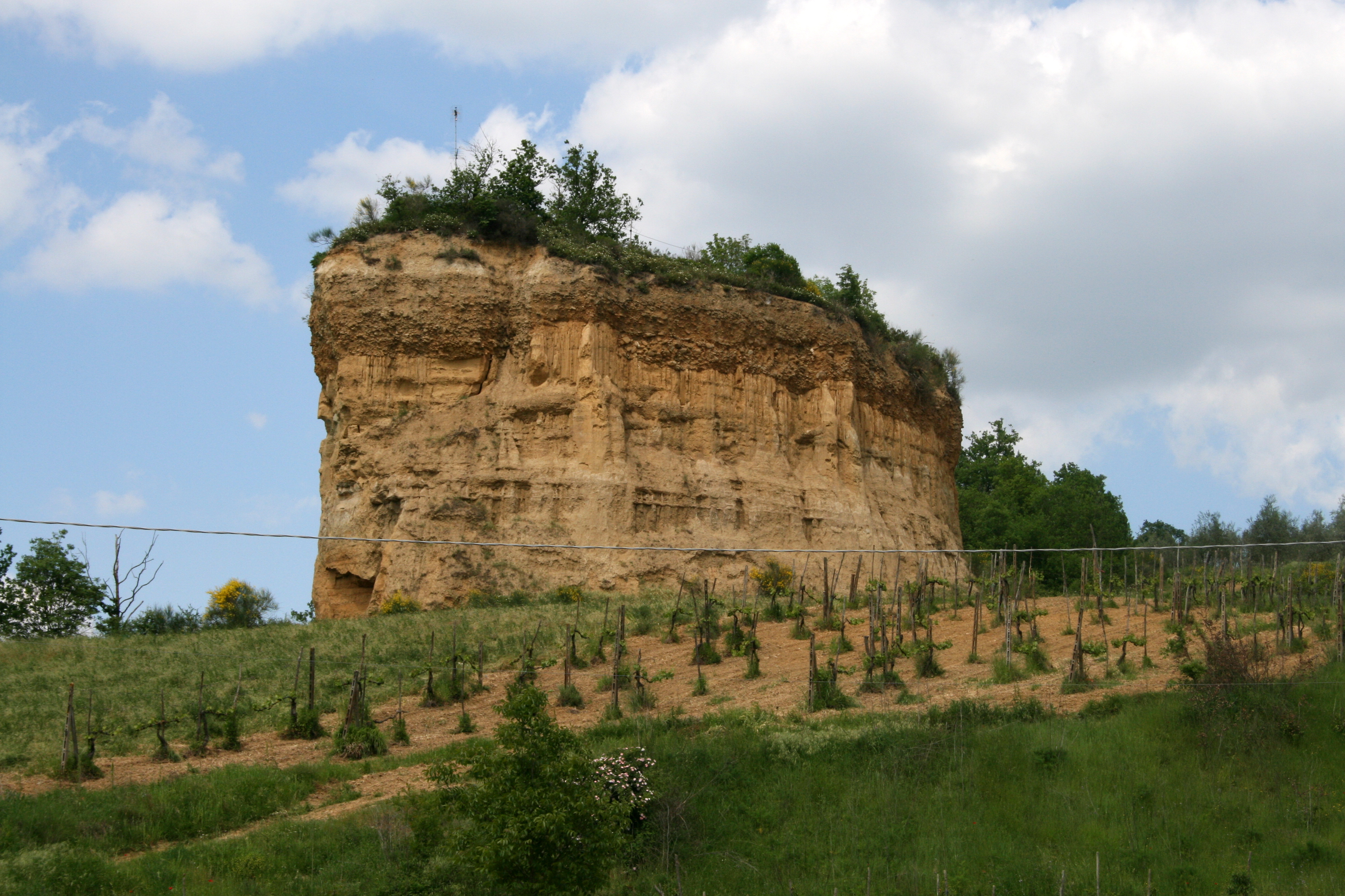 Balze del Valdarno